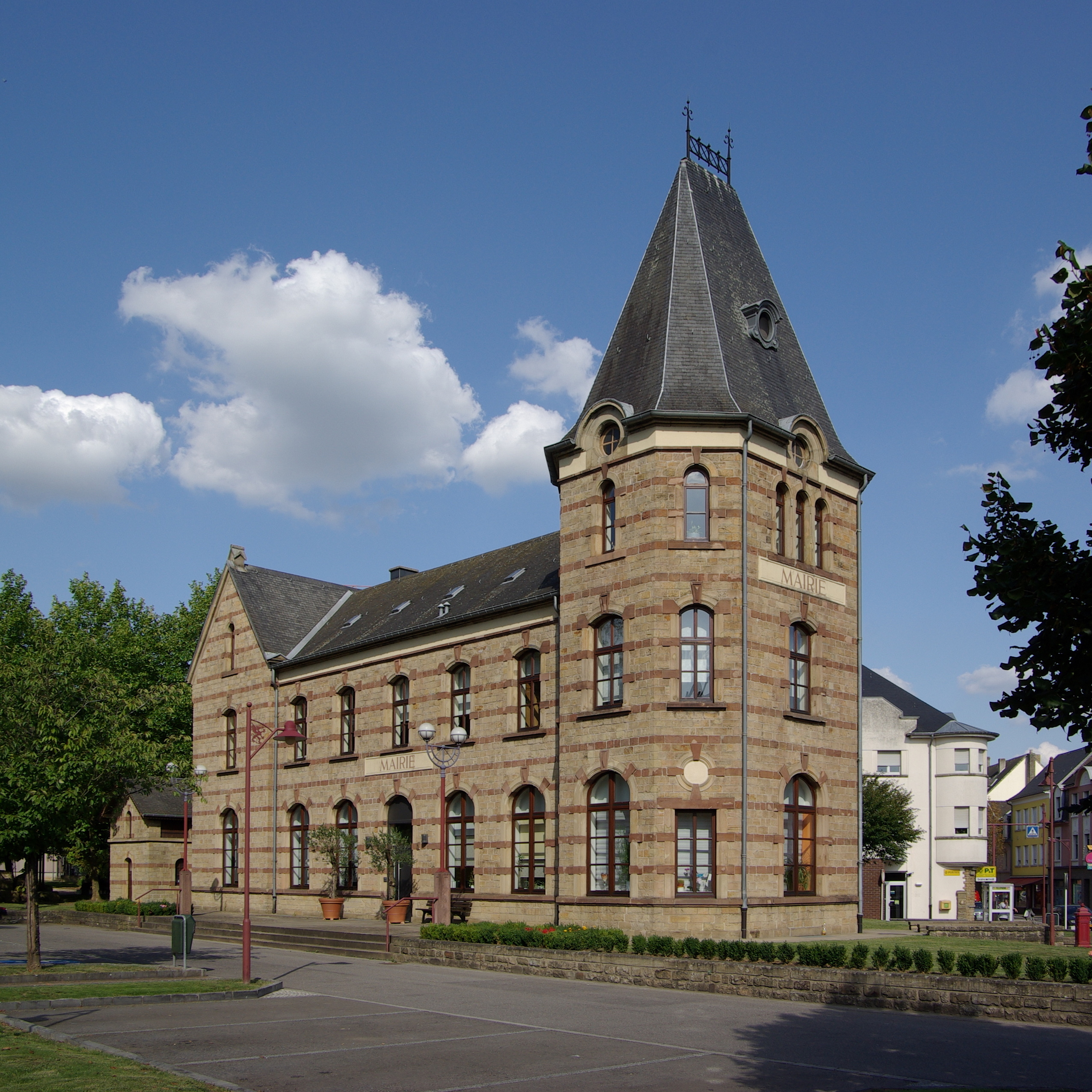 Luxemburg, Rathaus (Mairie) von Wasserbillig, ehemals Prinz Heinrich Bahnhof